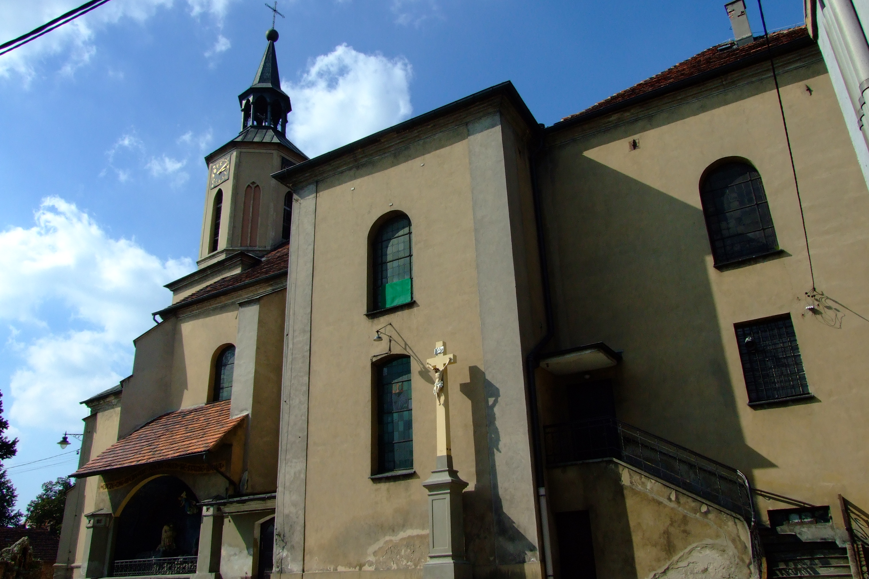 Kościół św. Mikołaja w Pyskowicach